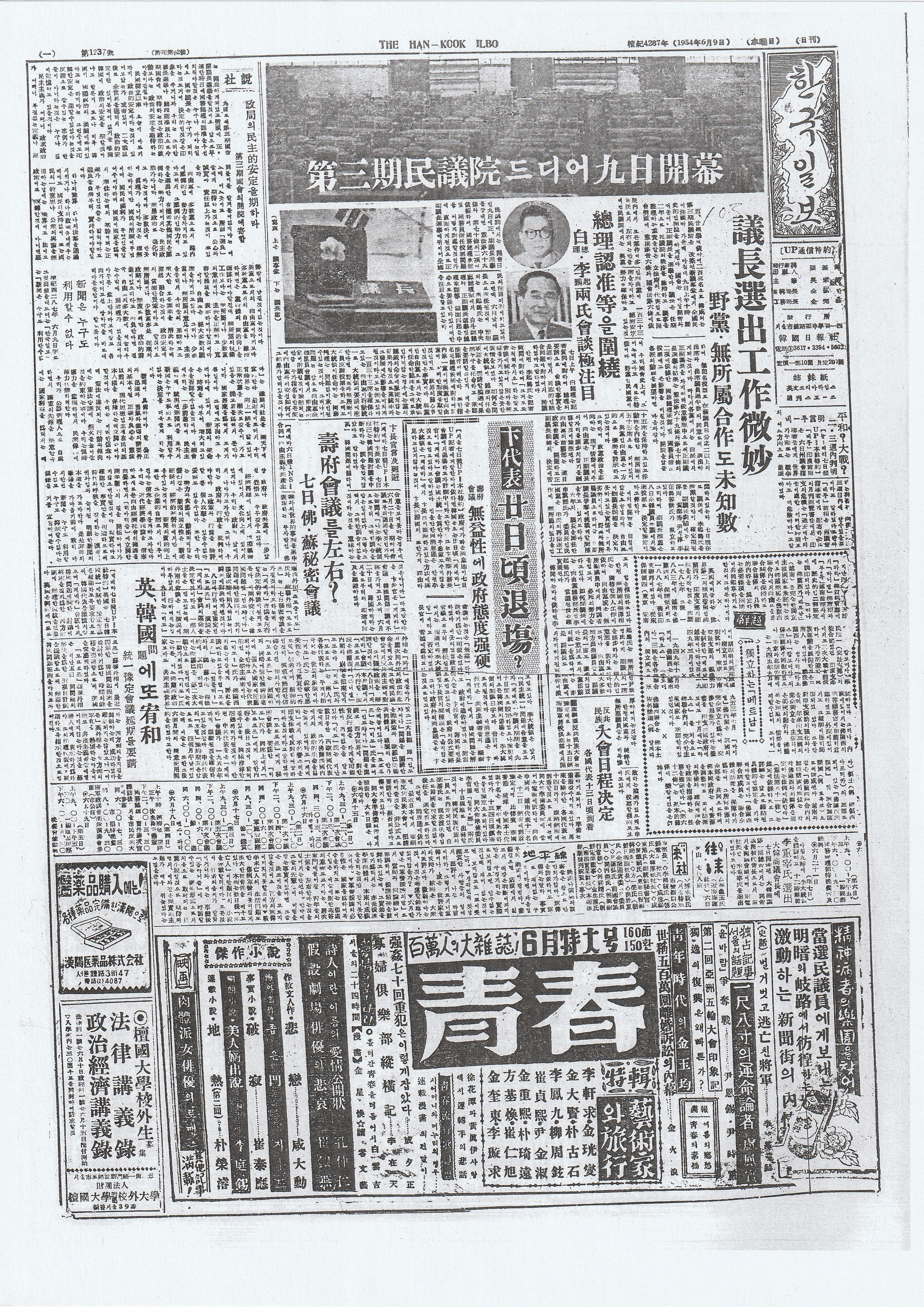 한국일보 축쇄판에서 복사해 온 한국일보 창간호 지면